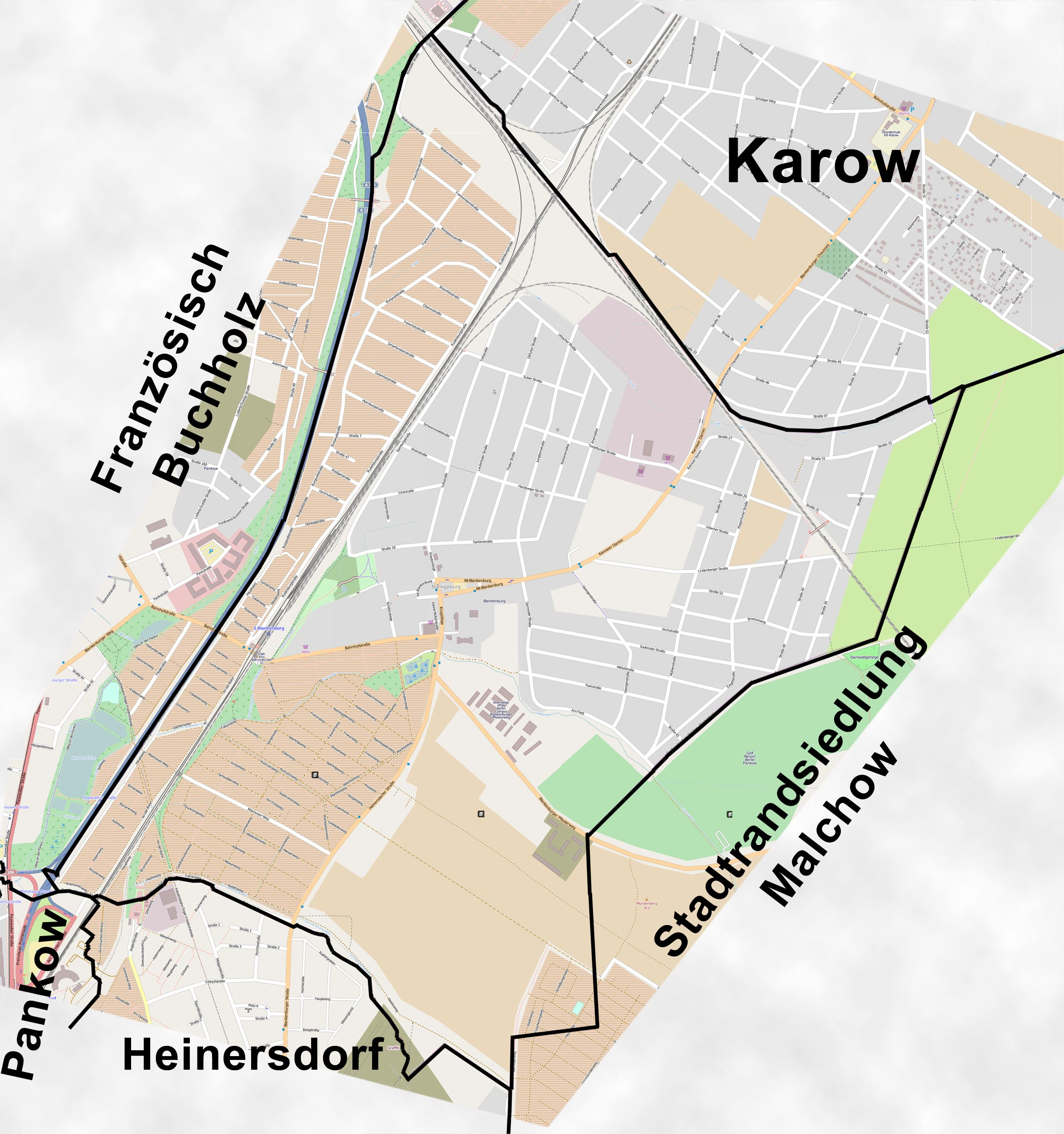 Straßen im Ortsteil Blankenburgf des Bezirkes Berlin-Pankow